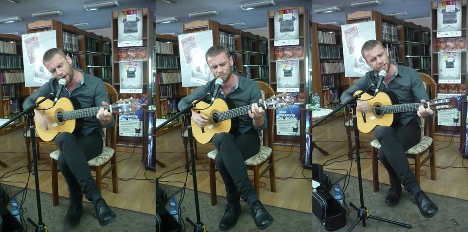 Piotr Dąbrówka w Nowej Rudzie, 2017